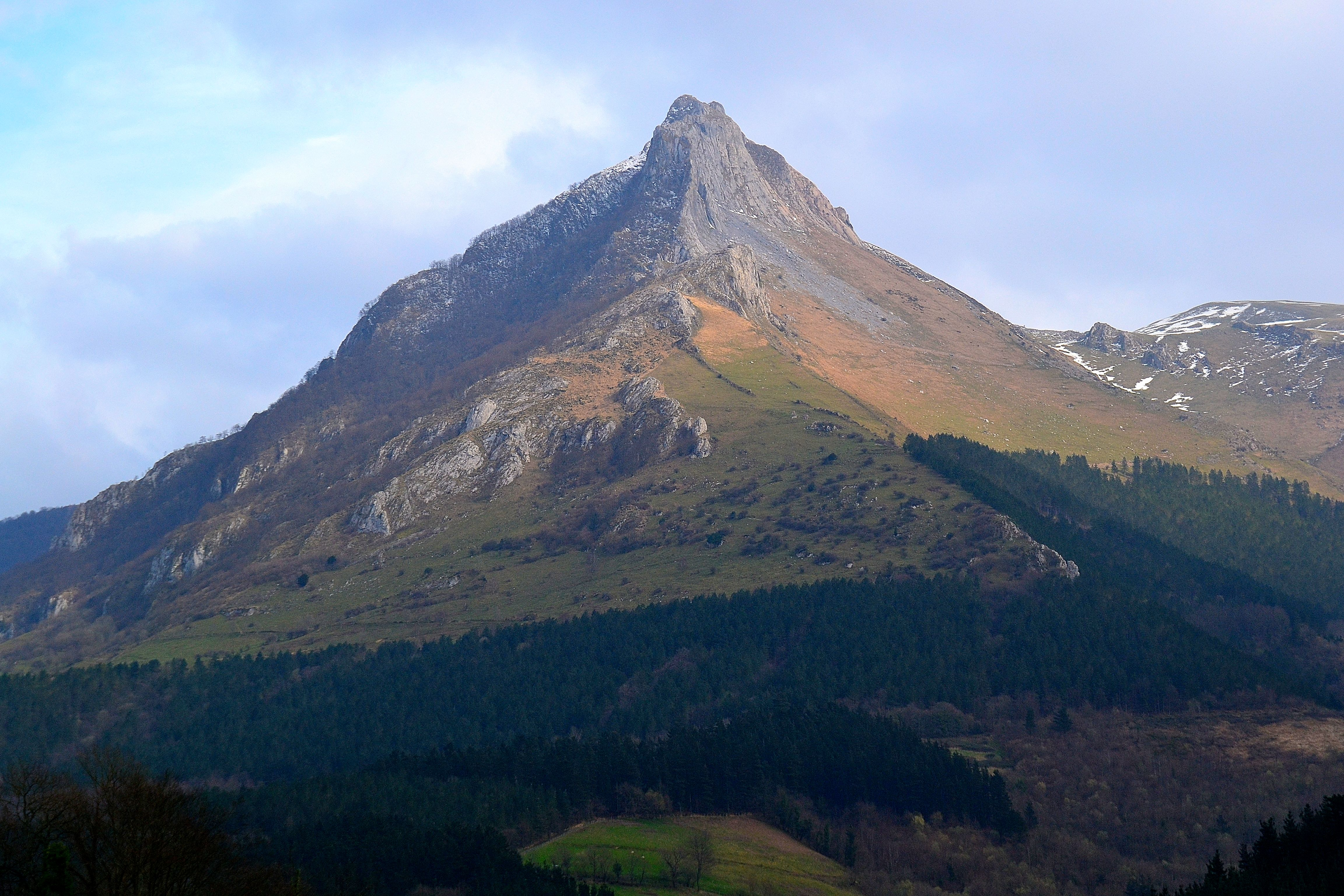 Txindoki mendia. Gipuzkoa, Euskal Herria. Txindoki mountain. Gipuzkoa, Basque Country.